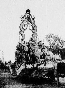 Le char de Rosa Blanche, Reine des Reines de Paris 1906.